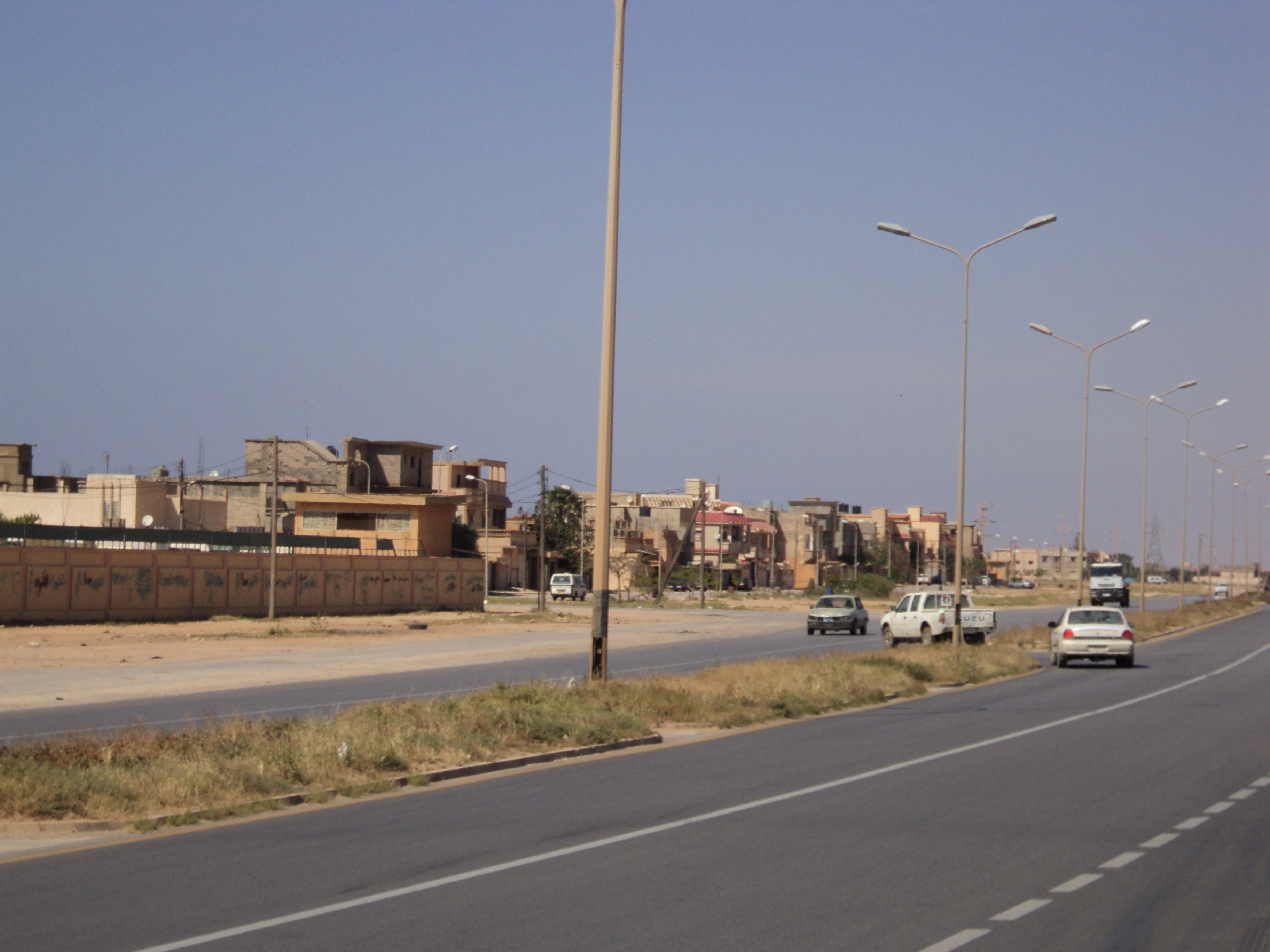 Sidi Khalifa, Benghazi.